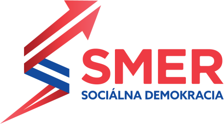 Logo politickej strany SMER-SD (Nový Smer)